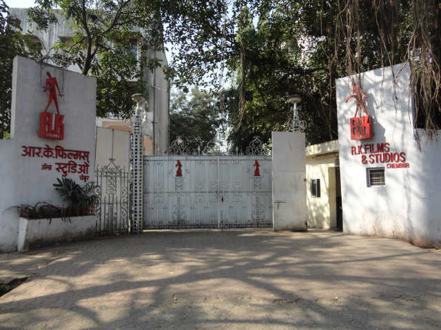 R.K. Studio, Chembur, Mumbai